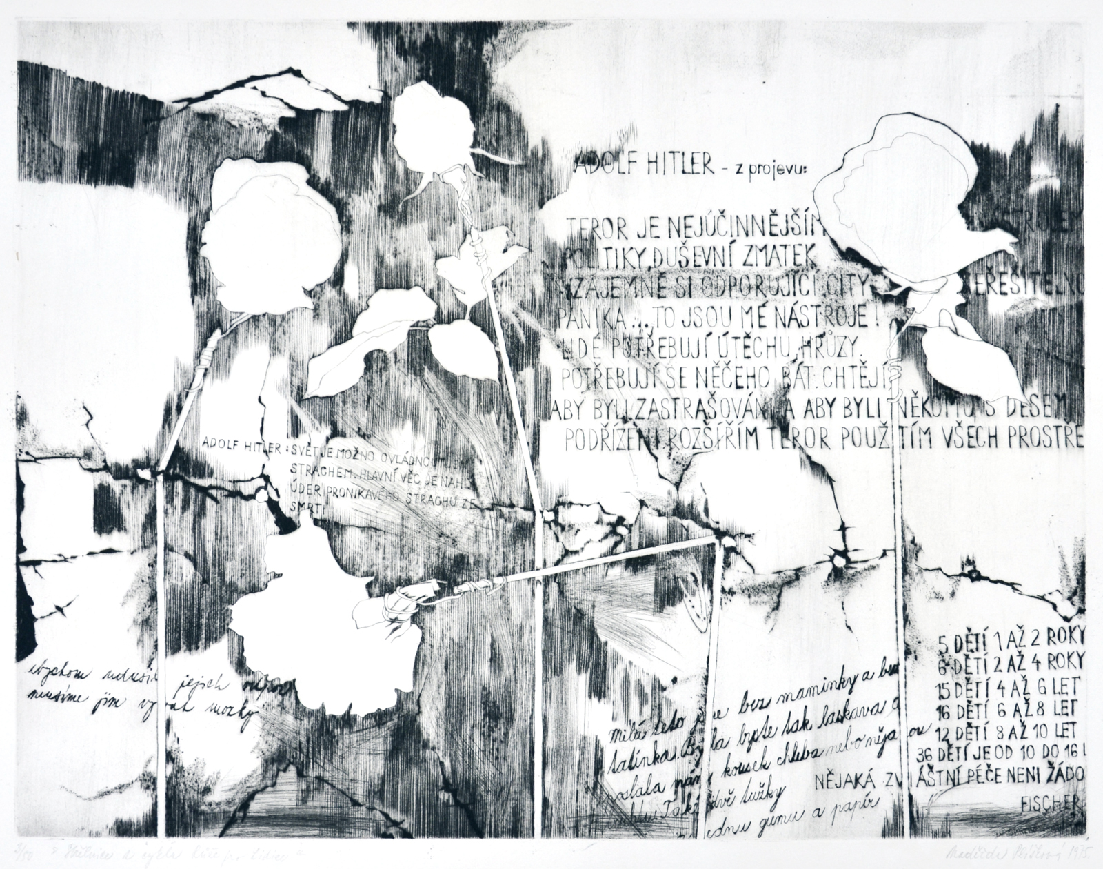 Naděžda Plíšková, Střelnice (Z cyklu Růže pro Lidice), suchá jehla, 39x49,5 cm, 1975